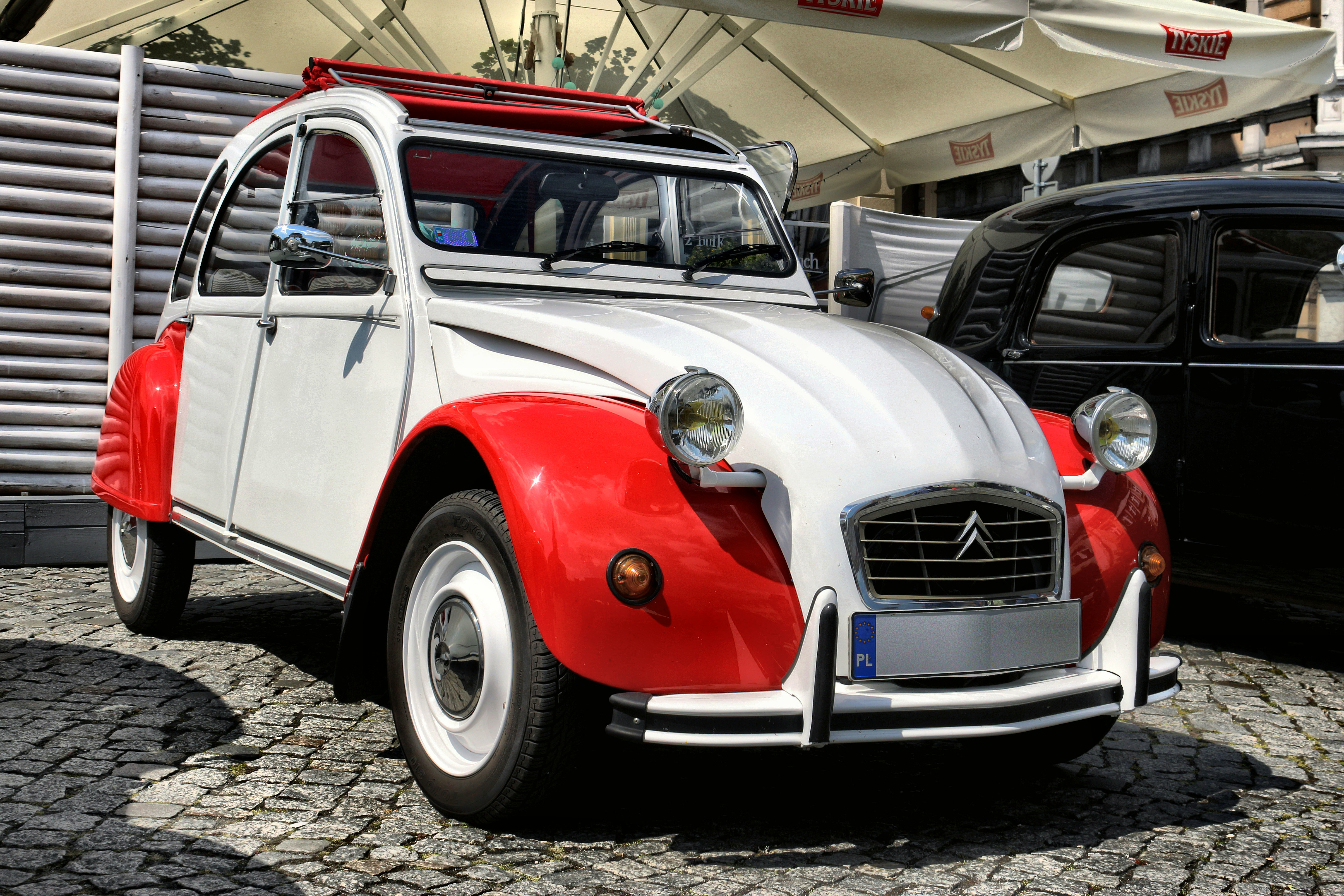 Citroen 2CV